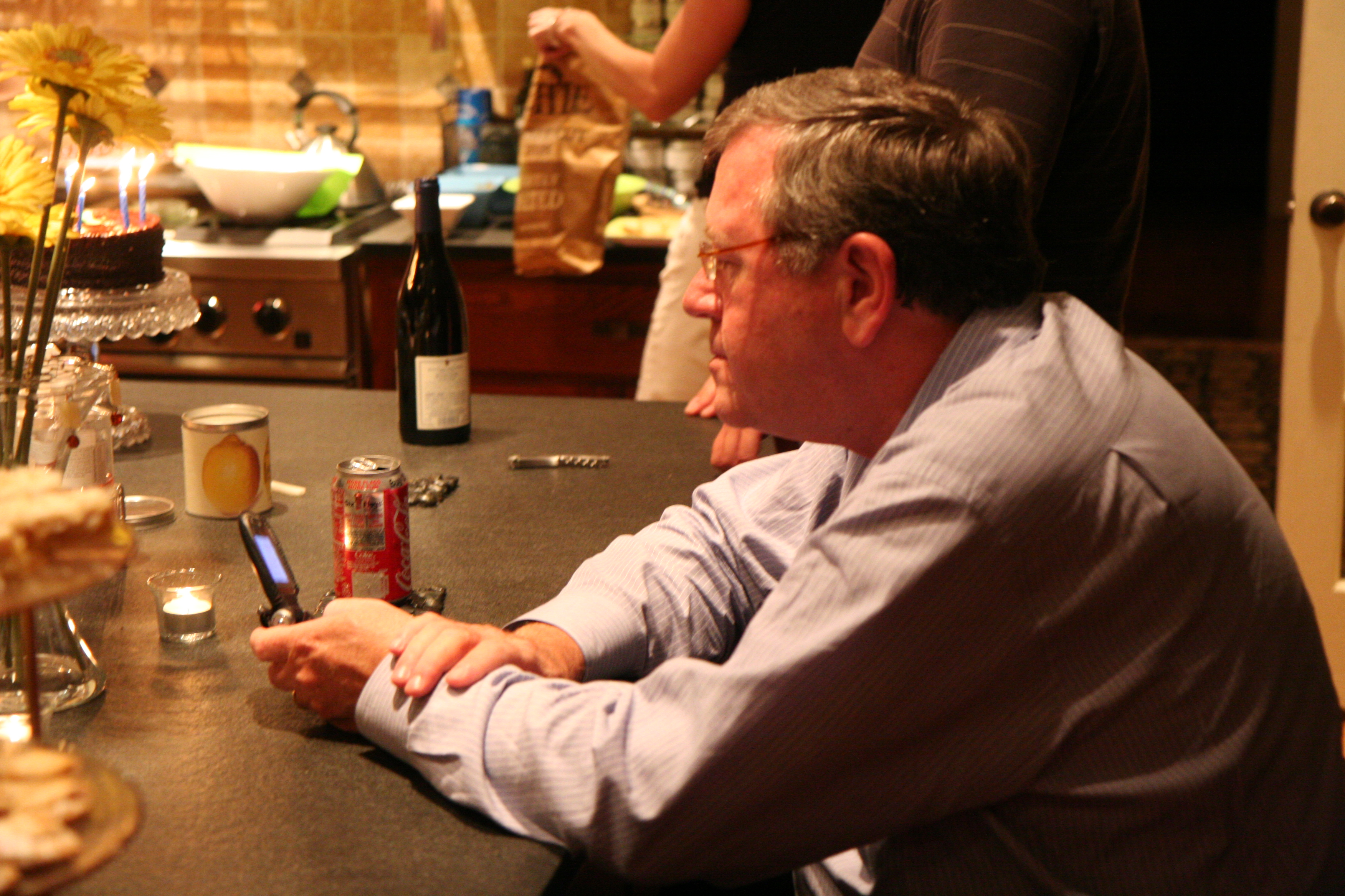 Russ being Russ - always working.